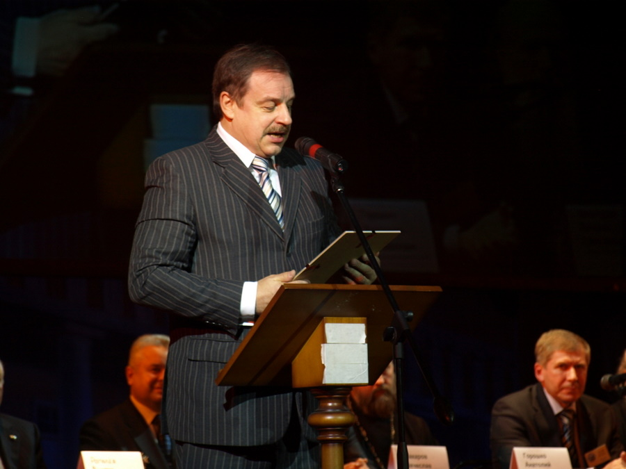 Im Jahr 2009 erhielt ein Kleinplanet (№ 16395) den Namen von Hl. Johannes. Auf dem Foto ist ein Mitglied der gesetzgebenden Versammlung, Anatoli Kosterev.